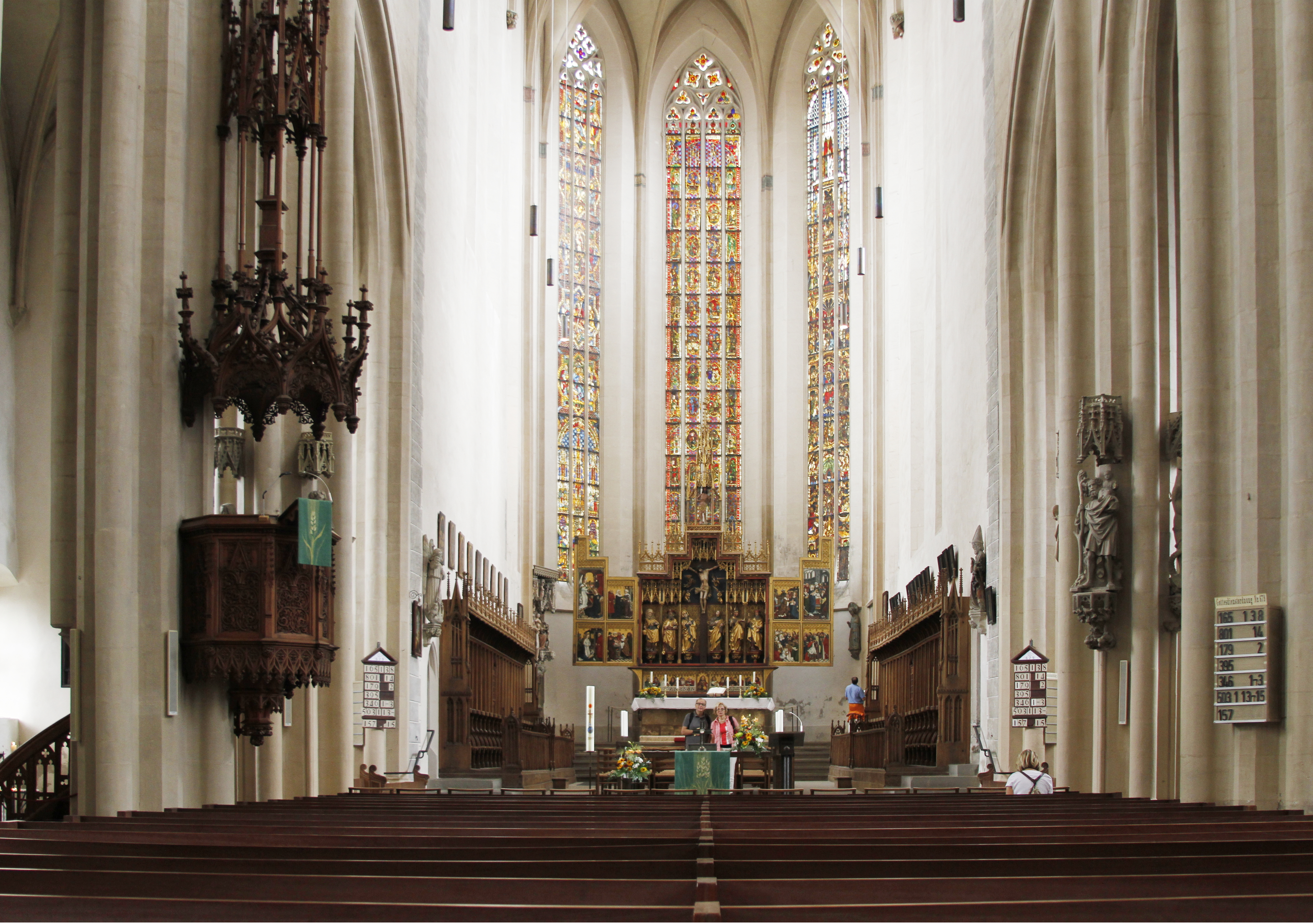 Interior of St. Jakob in Rothenburg ob der Tauber - Germany